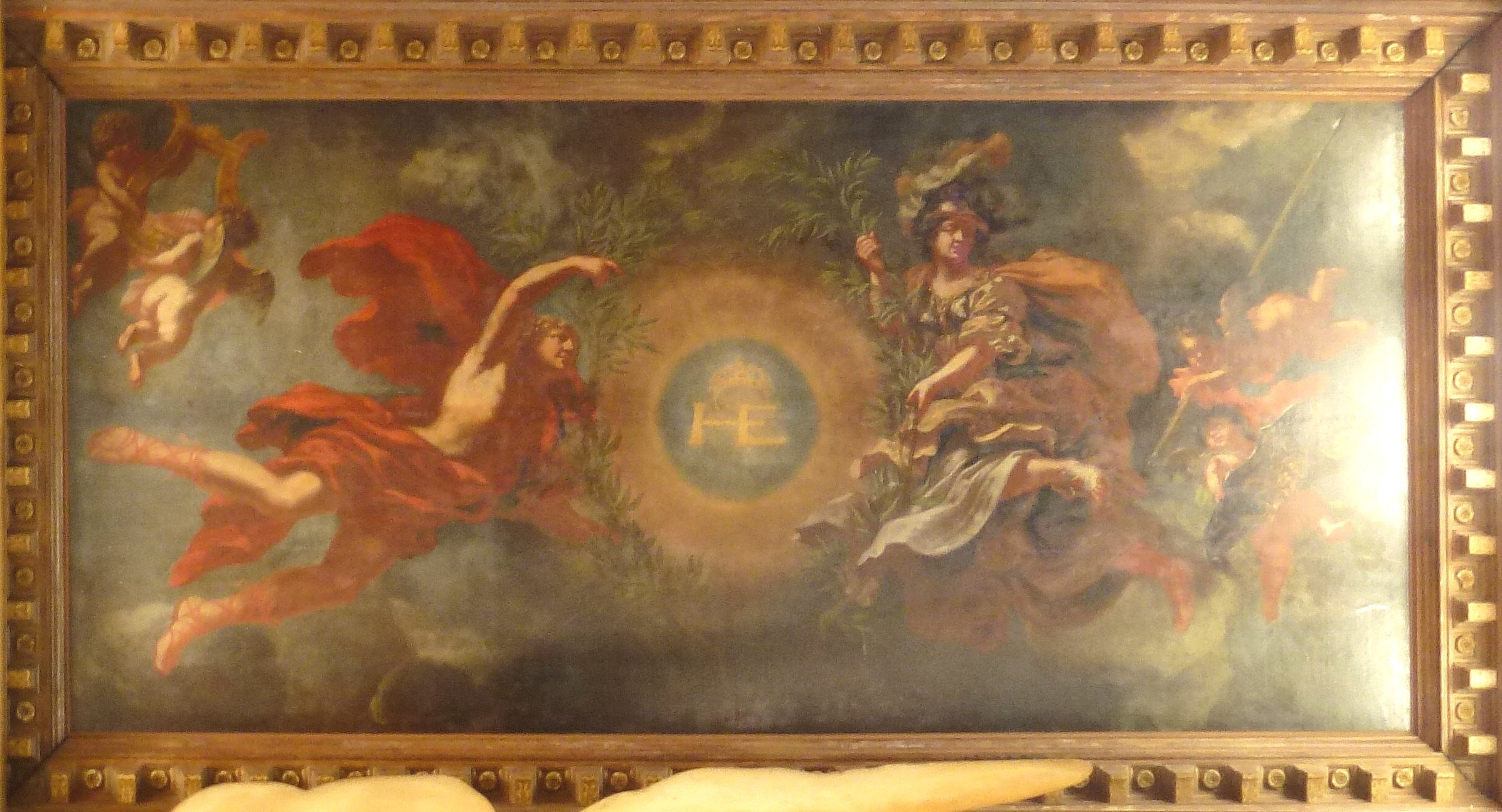 Drottningholms slott huvudtrappa, lanternin, plafond av David Klöcker Ehrenstrahl. David Klöcker Ehrenstrahls plafondmålning högst upp i den krönande lanterninen med Hedvig Eleonoras (HE) ljusomstrålande monogram, som kröns av Apollo och Minerva.